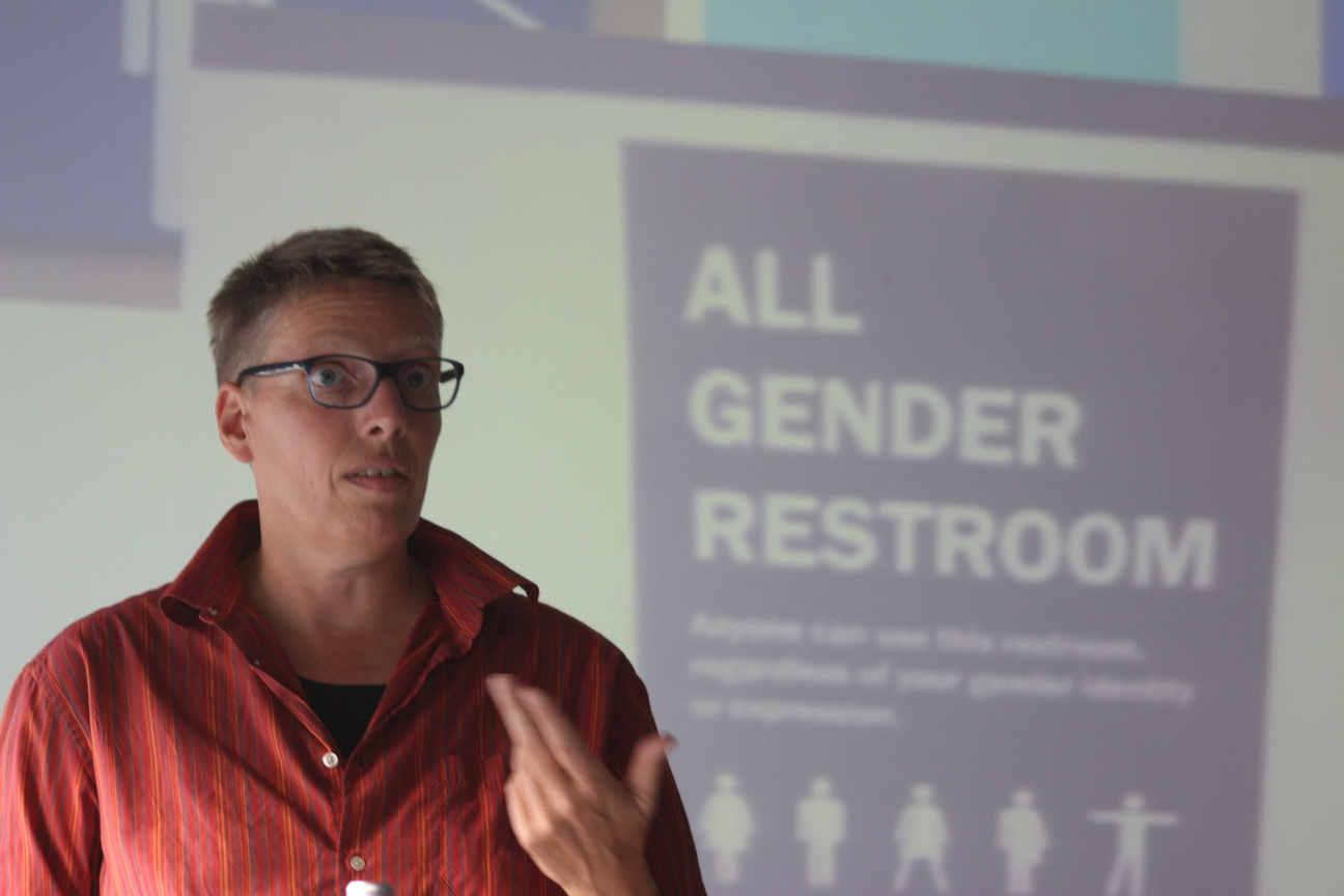 Am 20. Juli 2015 hat Lann Hornscheidt als Gast einen Vortrag über Sprache für die DSA auf Schloss Torgelow gehalten.